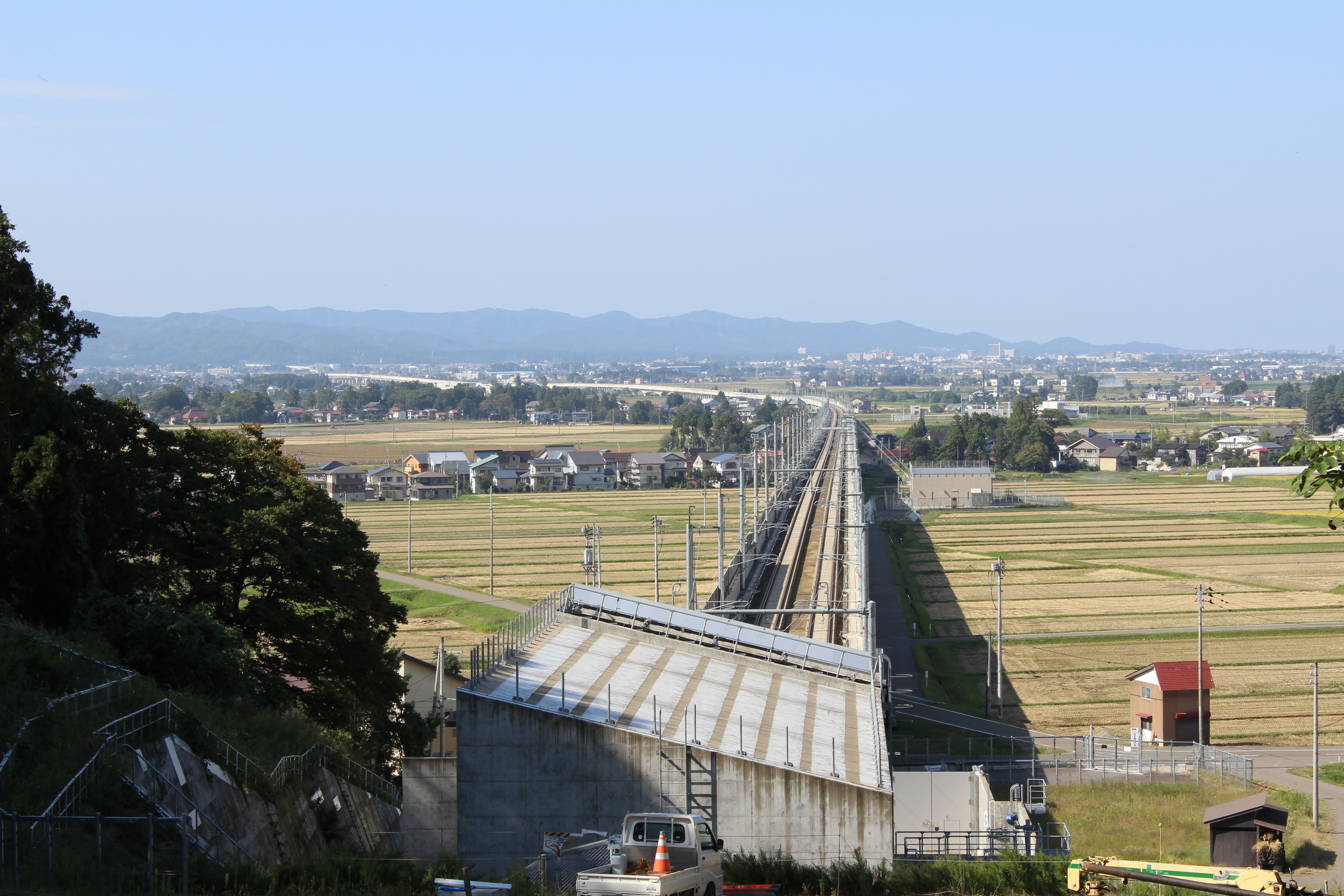 北陸新幹線。飯山トンネル出口付近より高田平野を望む。新潟県上越市。左遠方に高田トンネル入口と上越妙高駅の駅舎が見える。